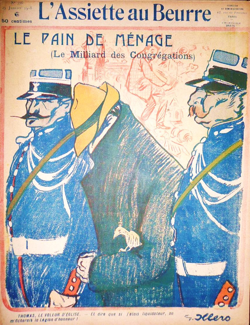 L'Assiette au beurre n° 356 du 25 janvier 1908 : « Le Pain des ménages (Le Milliard des Congrégations) » par G. Illero.